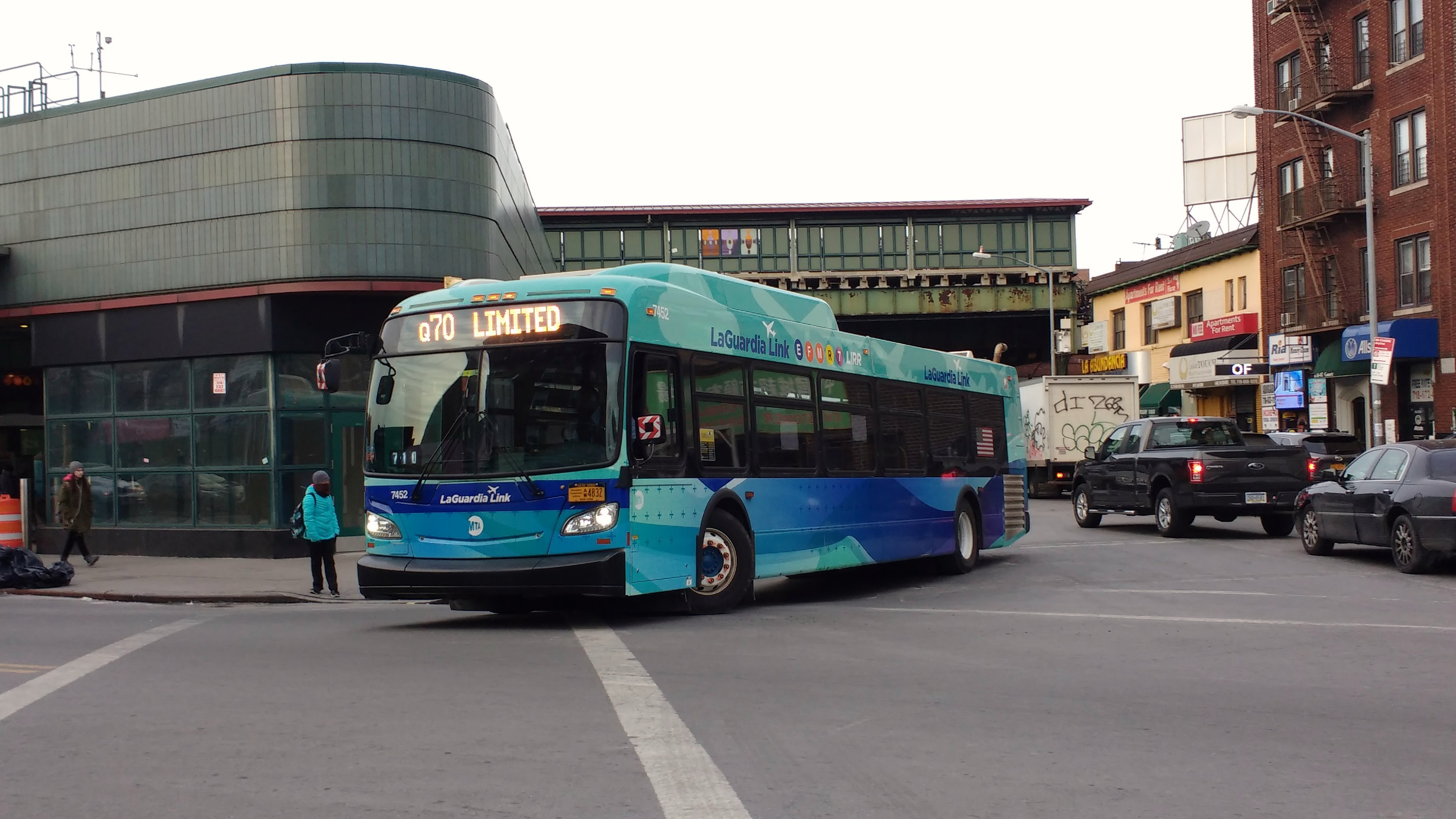 MTA Bus 7452